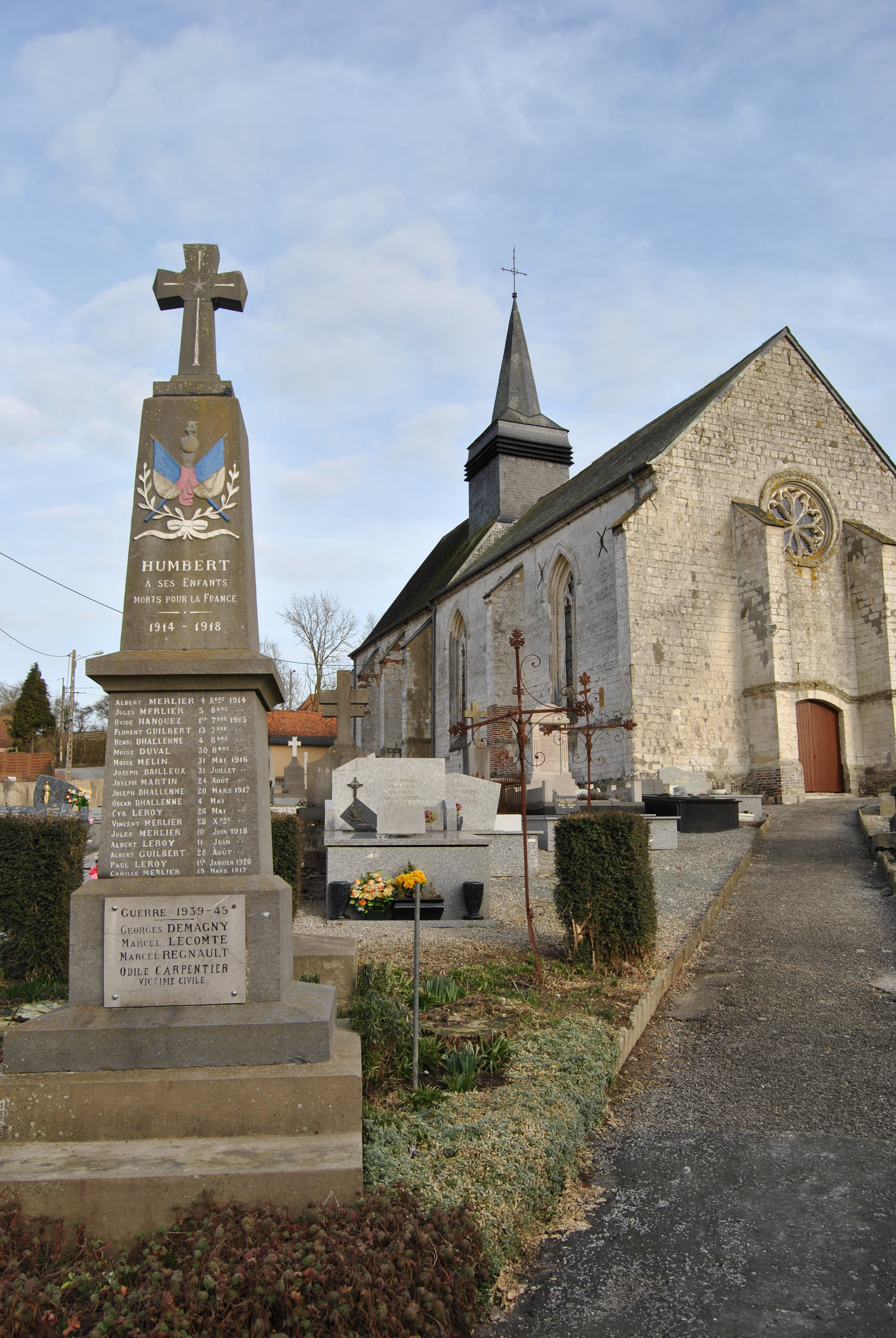 Le monument aux morts et l'église d'Humbert